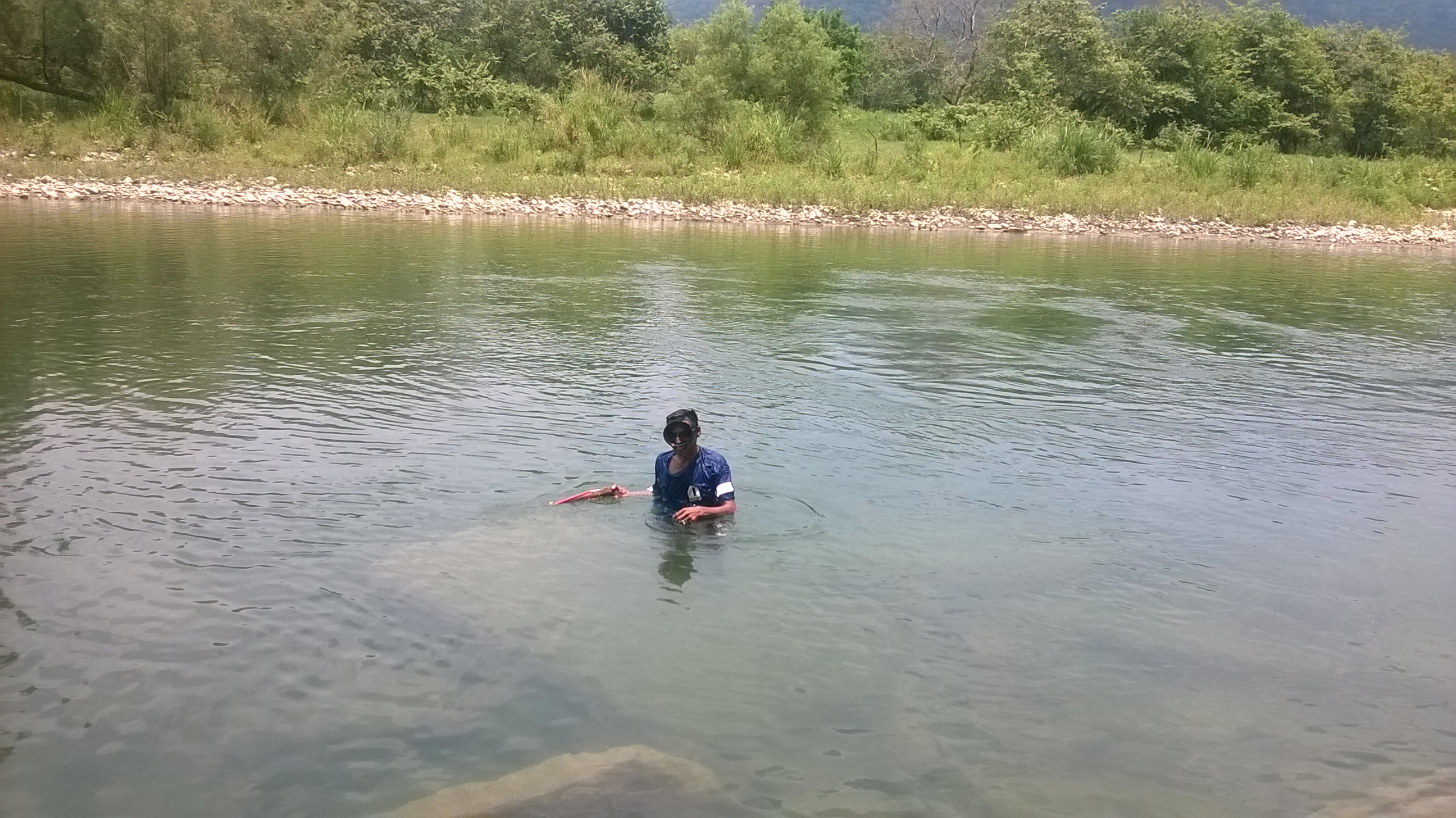 Pescador del Río Calabozo, en la sección que corresponde a la comunidad de Coatzonco, Huautla, Hidalgo.